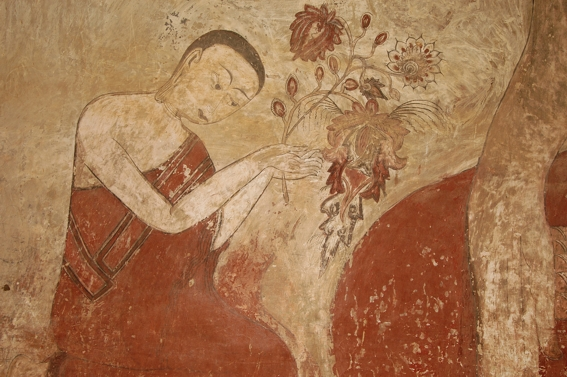 Wunderschönes, uraltes Fresko in Bagan